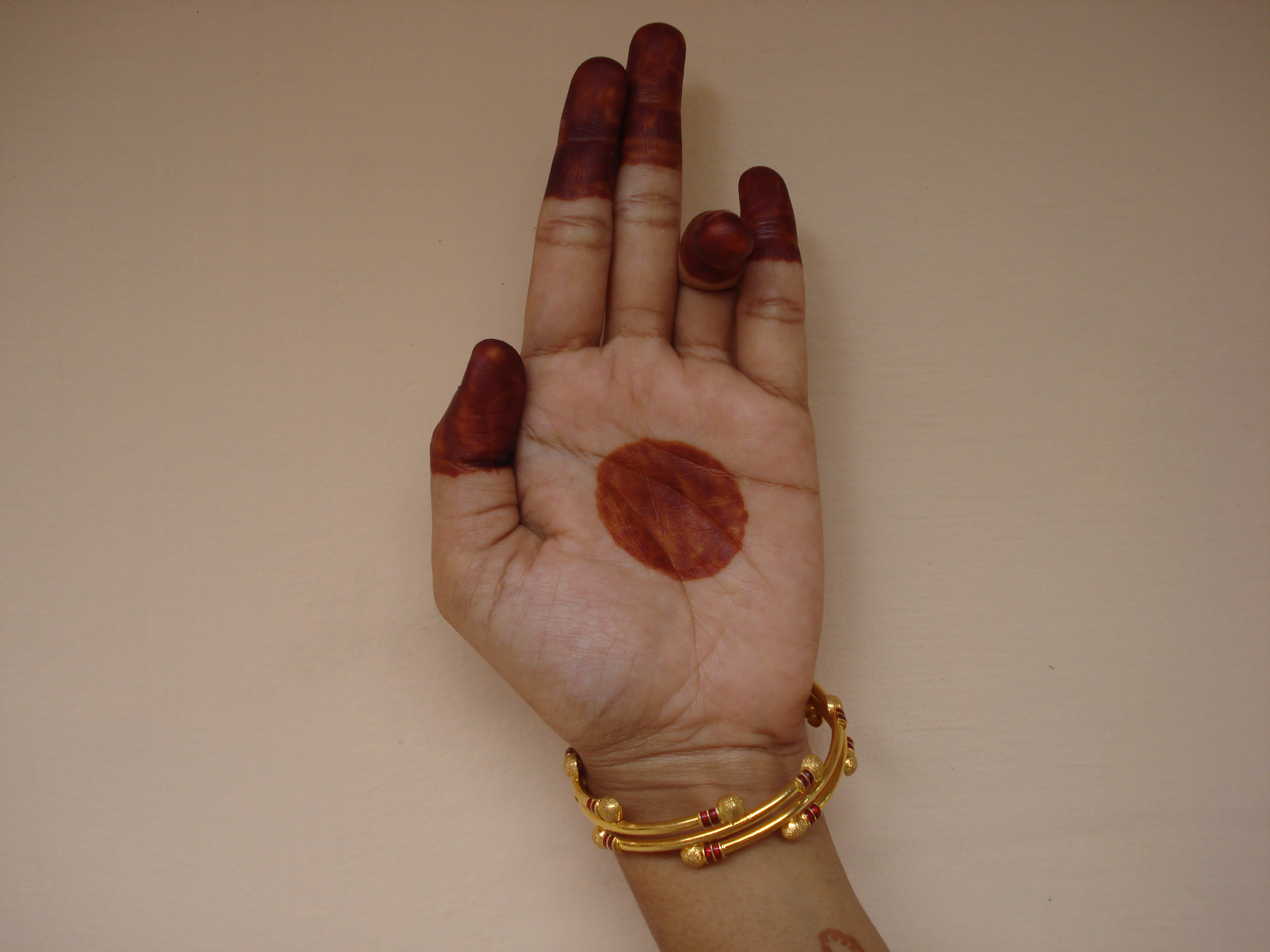 ത്രിപതാക ഹസ്തം